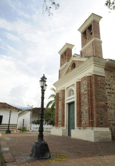 Bella iglesia,construccion atigua muy bella.